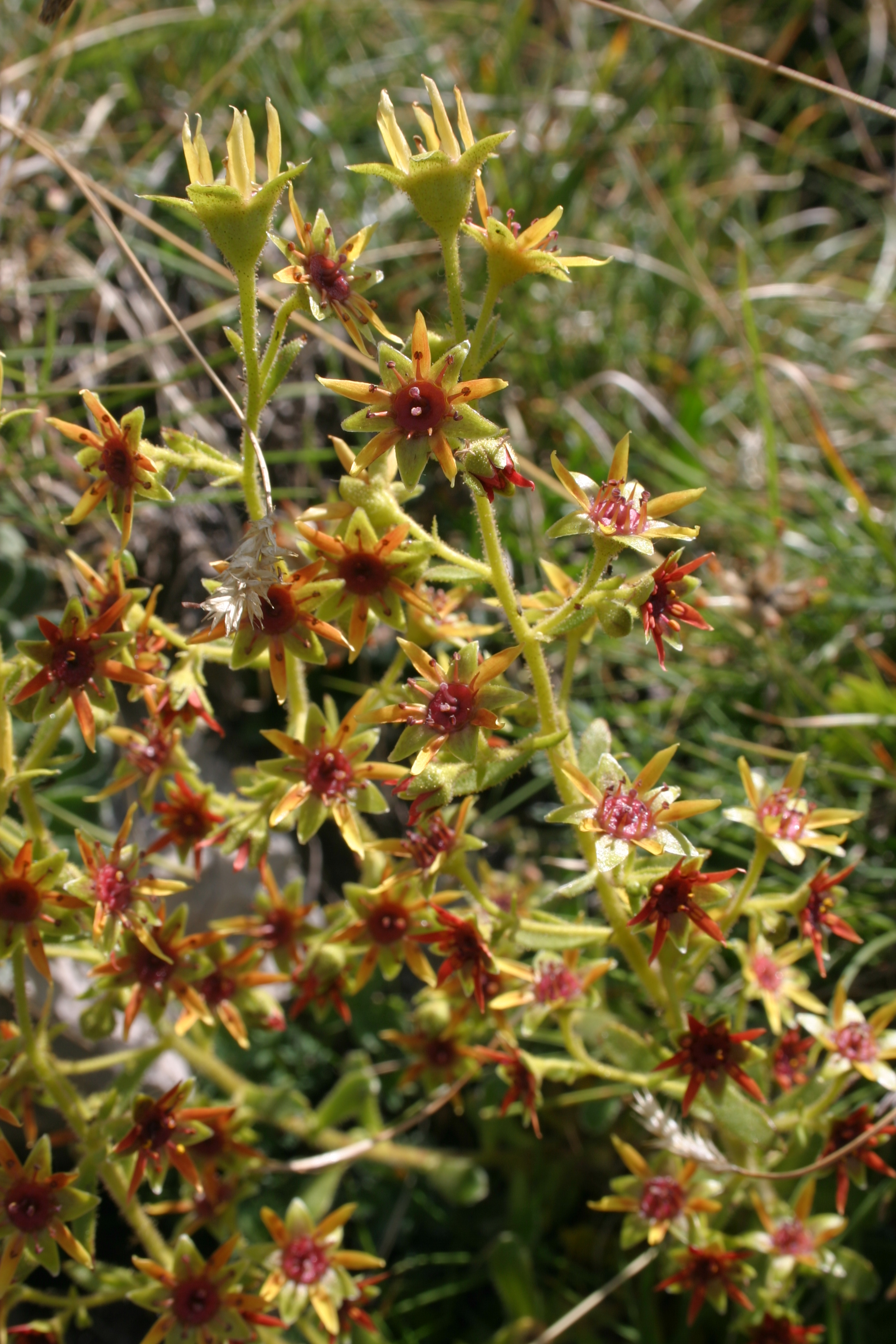 Saxifraga mutata, Foto am Mt. Baldo, Italien